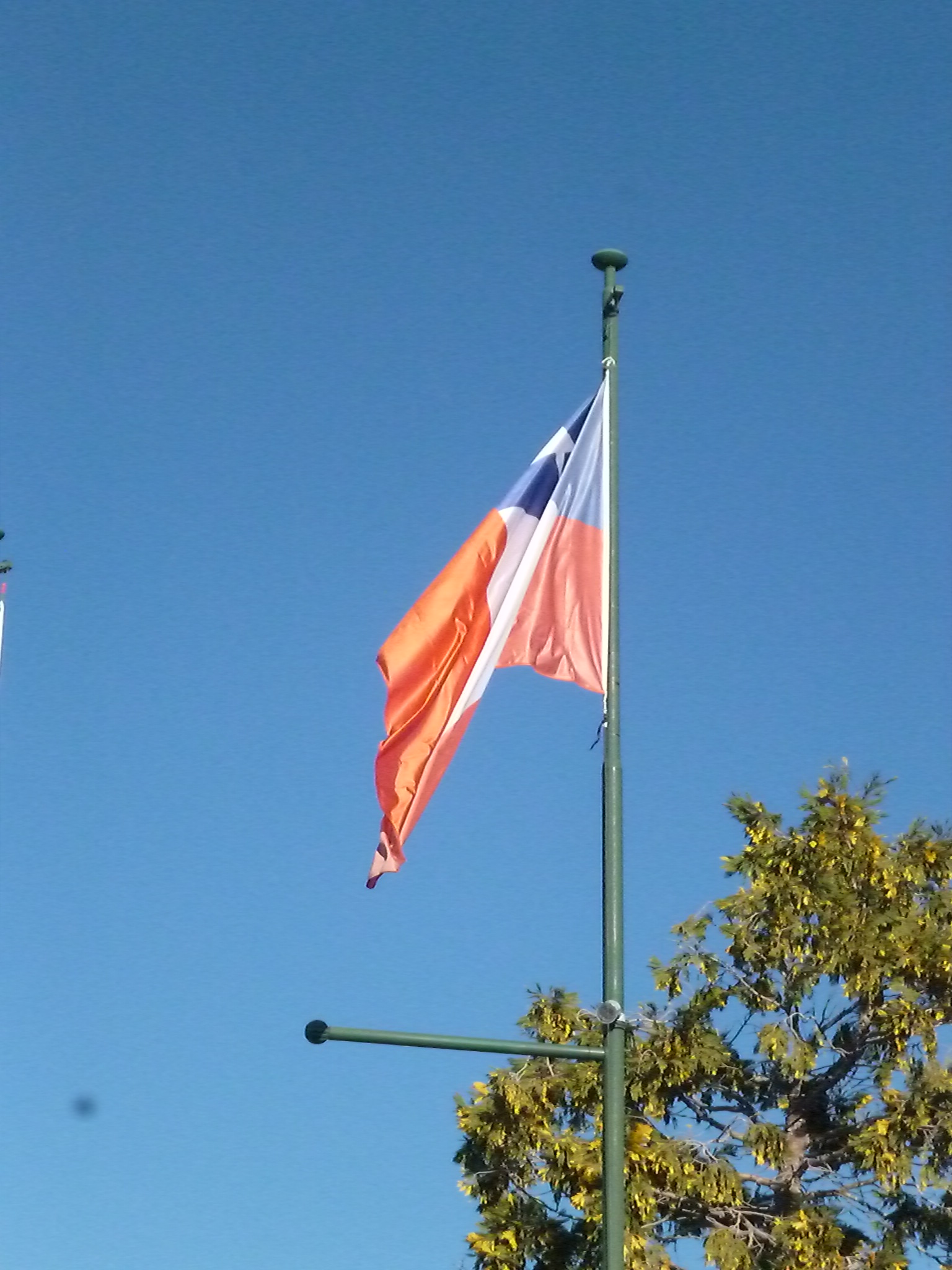 Bandera chilena en la Plaza de las Colectividades en la ex estación de tren de Trelew